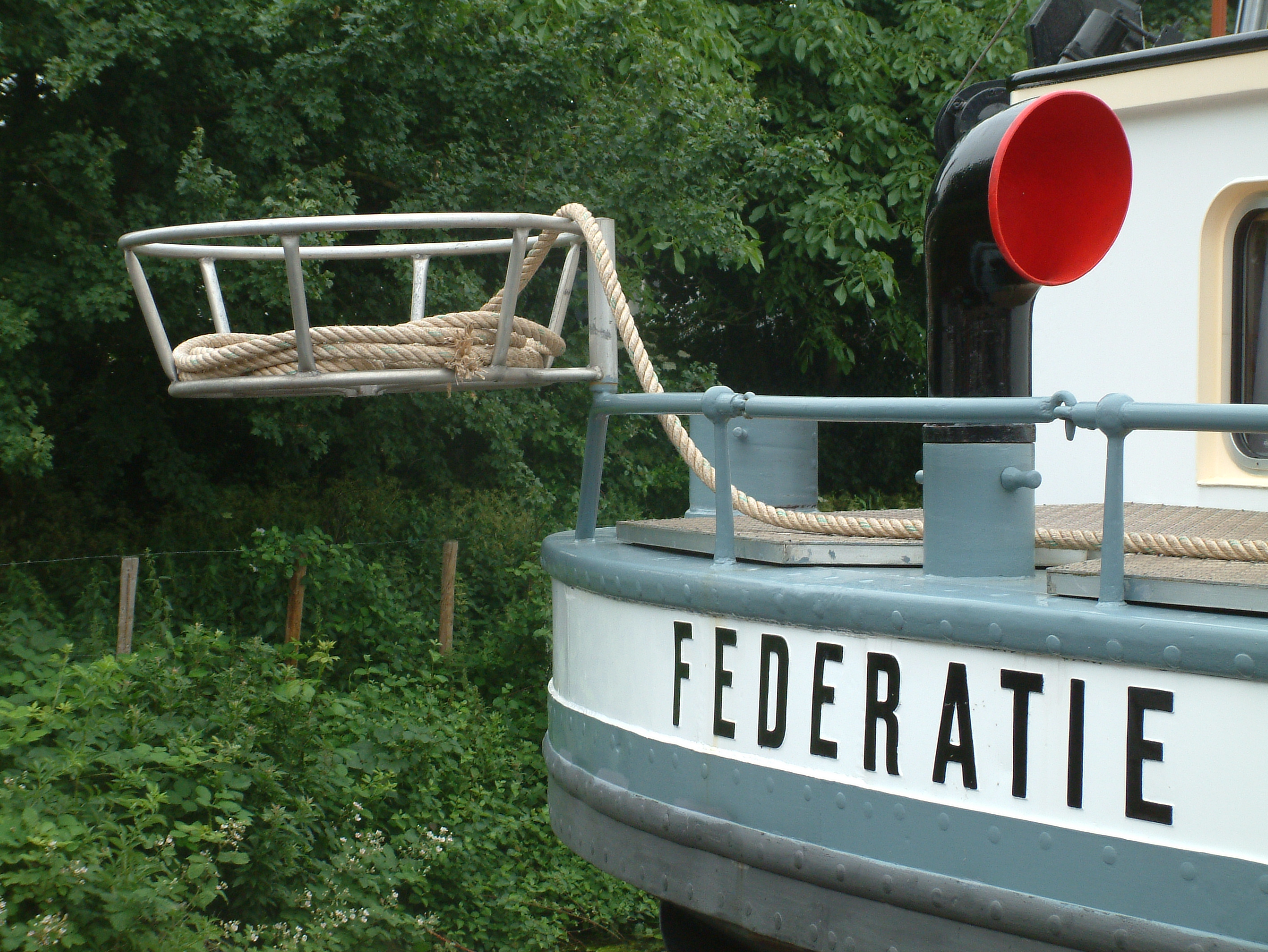 Draadmand op het achterdek van een binnenschip. De functie is het voorkomen van kinken bij het uitvieren van het touw. De slimme oplossing is hier dat ruimte op het dek wordt vrijgehouden door de korf bij gebruik buitenboord te draaien.